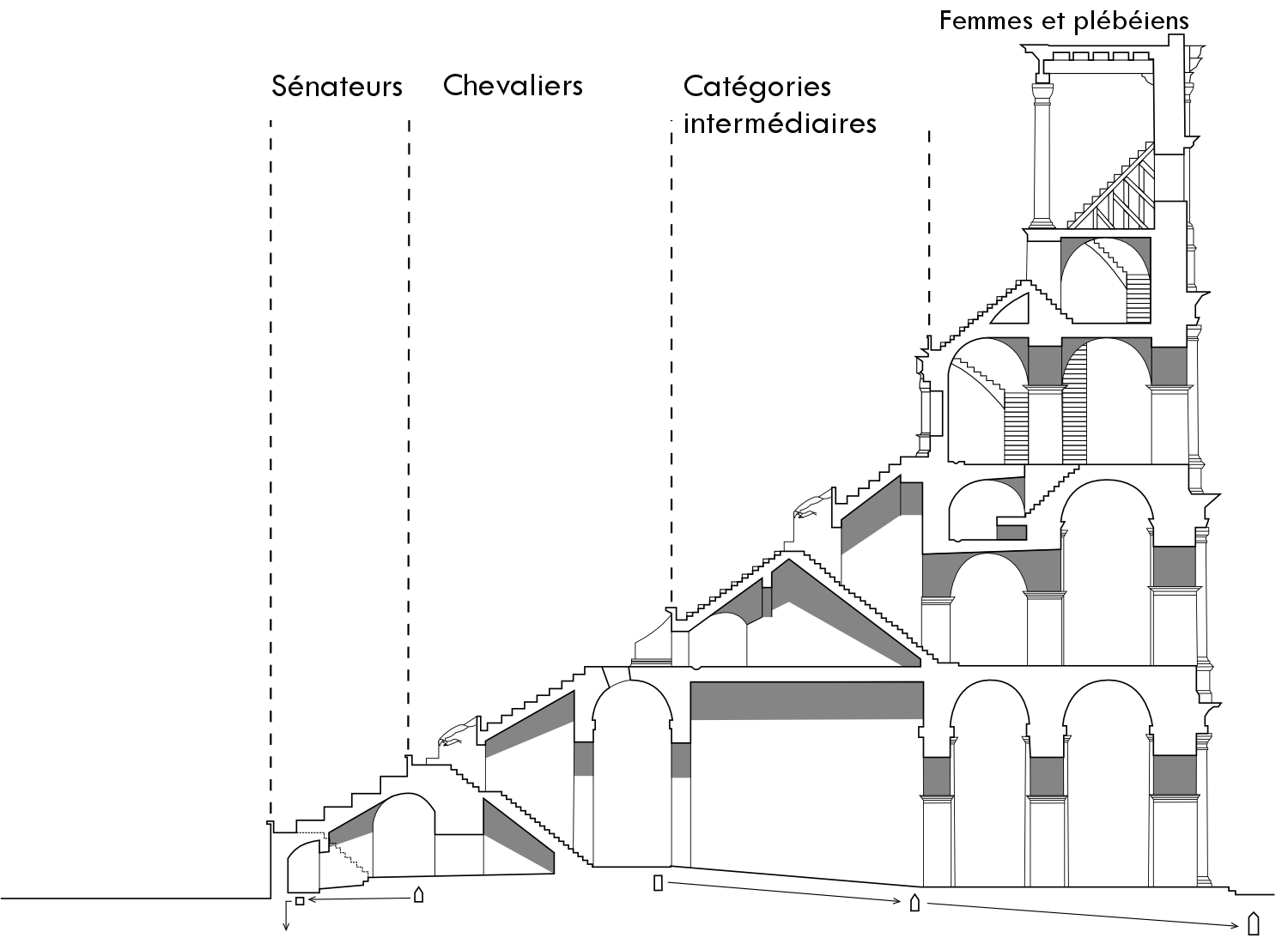 Plan en coupe des tribunes du Colisée de Rome avec indication de la répartition des spectateurs selon leur catégorie sociale.